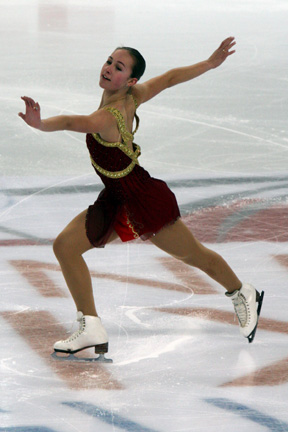 Kimmie Meissner 2007-2008 Grand Prix of Figure Skating Final